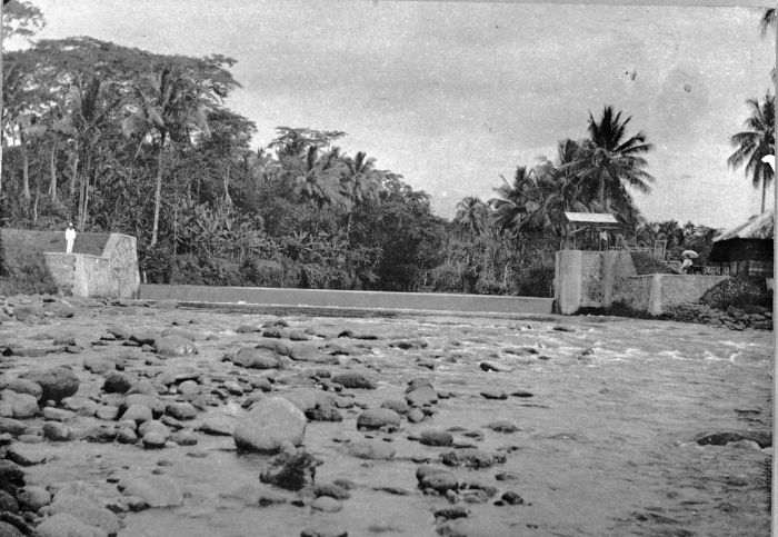 Foto. De dam in de Bandjaran-rivier, voltooid in 1903, Java